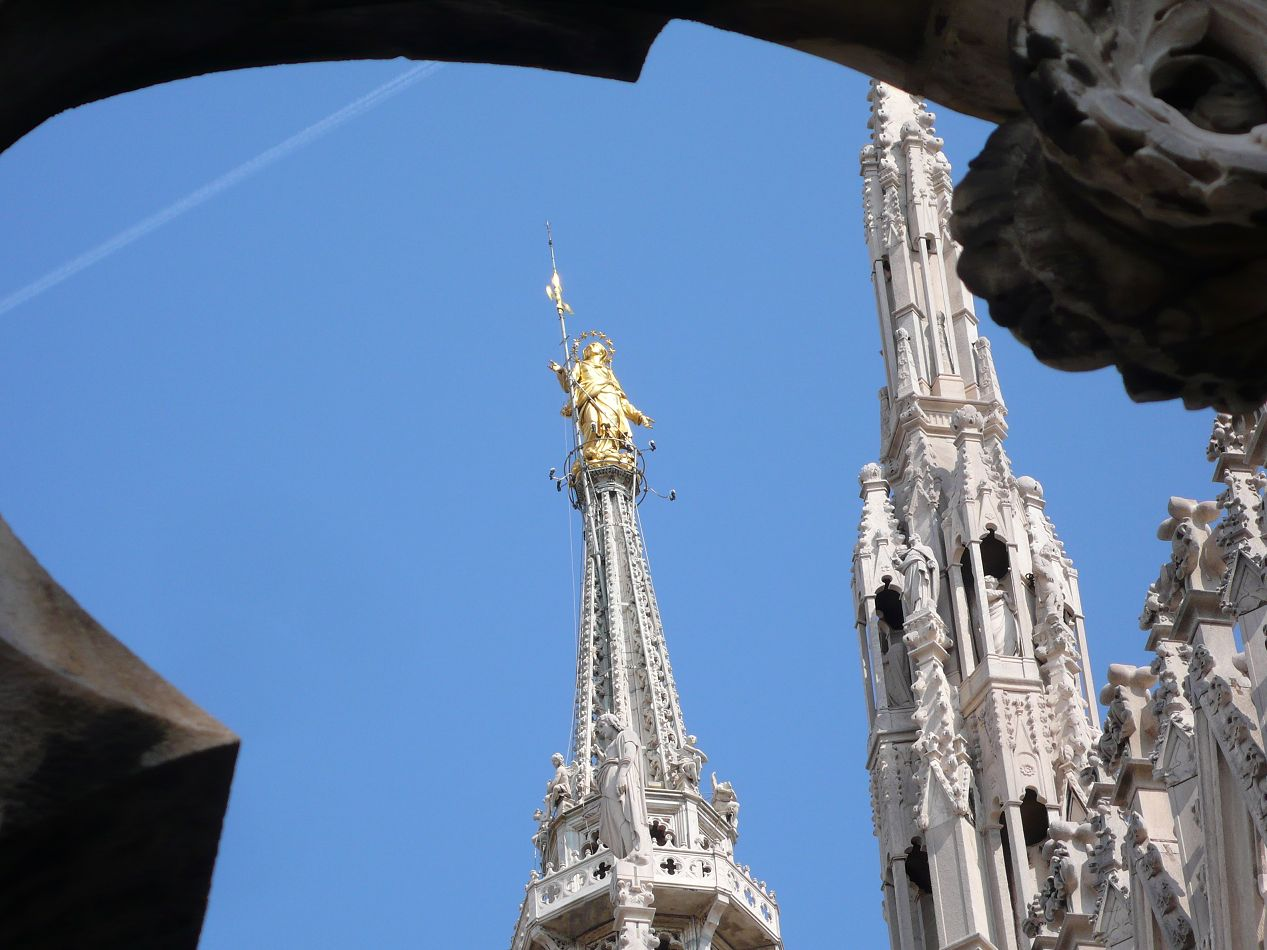 Duomo di Milano, Madonnina